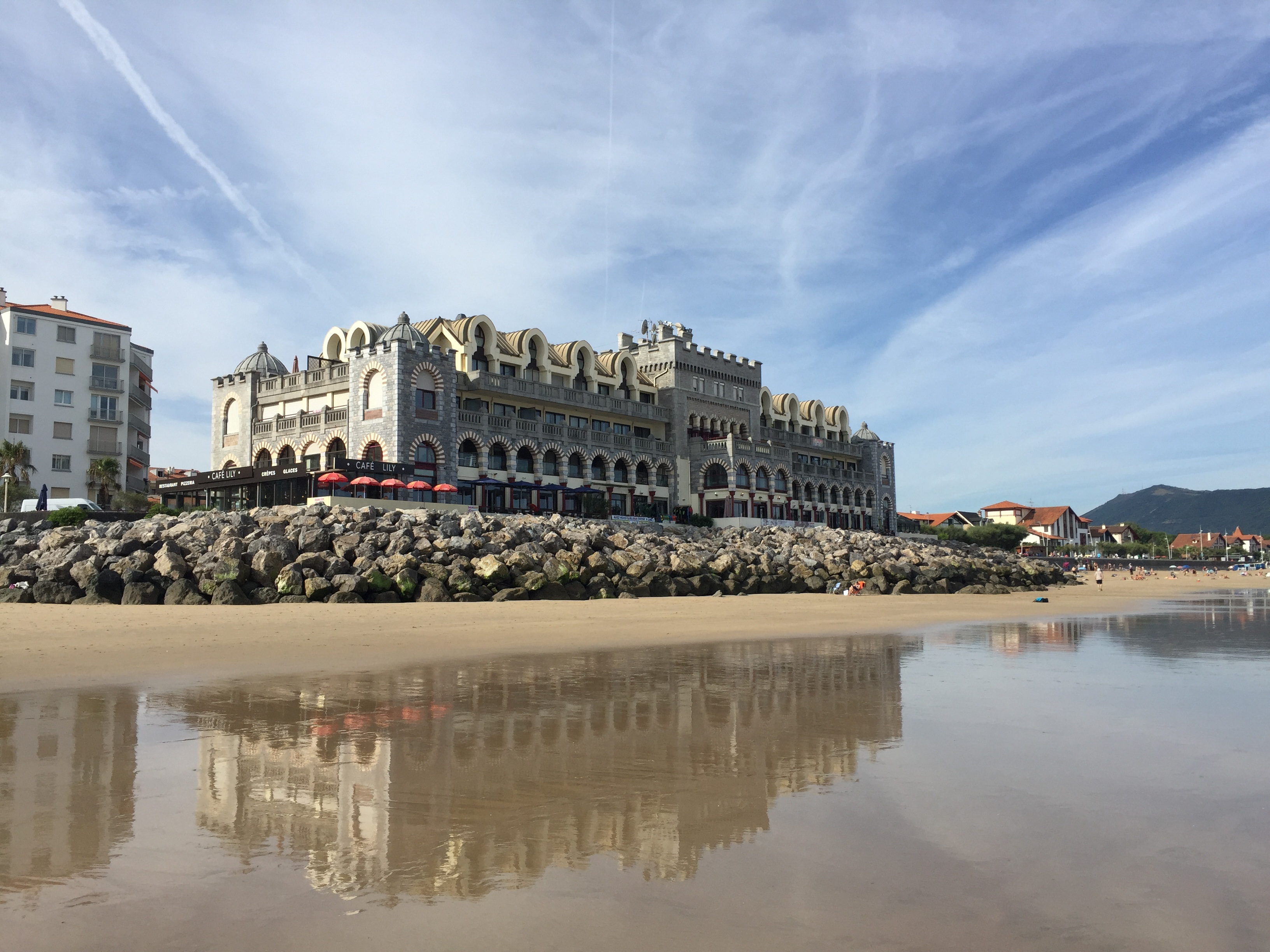 Ancien casino d'Hendaye